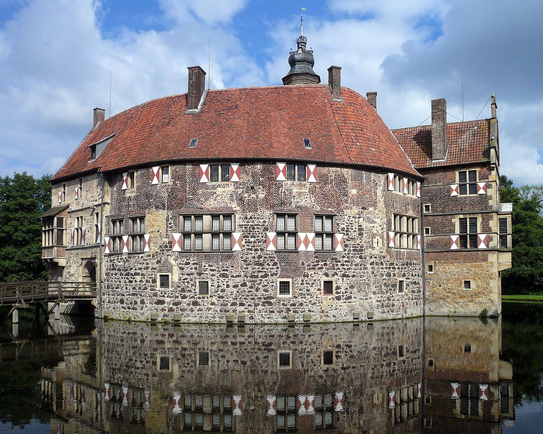 Die von Bischof Gerhard von der Mark 1271 erbaute Burg Vischering bei Lüdinghausen diente bis 1521 als reines Verteidigungsbauwerk. Durch spätere Umbauten aus der Zeit der Renaissance verlor die Anlage ihre Funktion als Burg und diente seitdem den Eigentümern mehr als Wohnsitz.